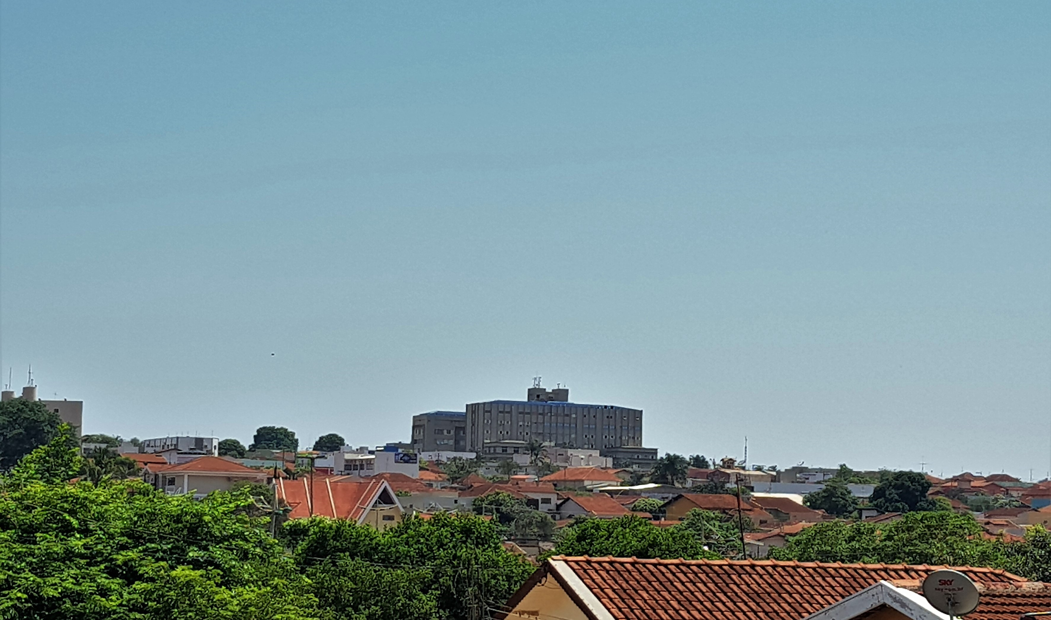 Vista da Santa Casa de Misericórdia de Barretos